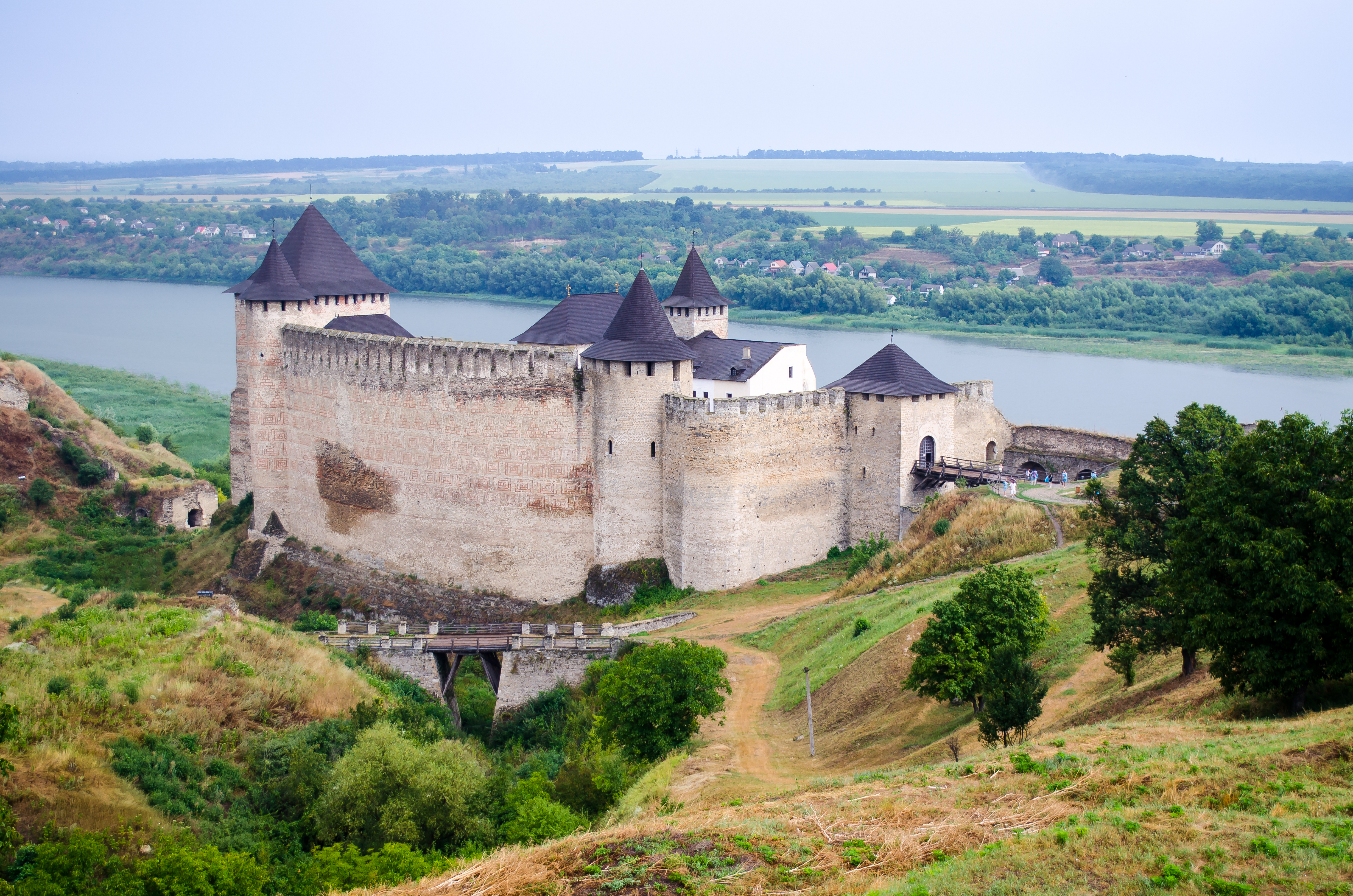 Комплекс споруд фортеці, Хотин, вул. Фортечна